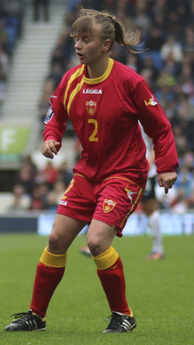 Željka Radanović of Montenegro